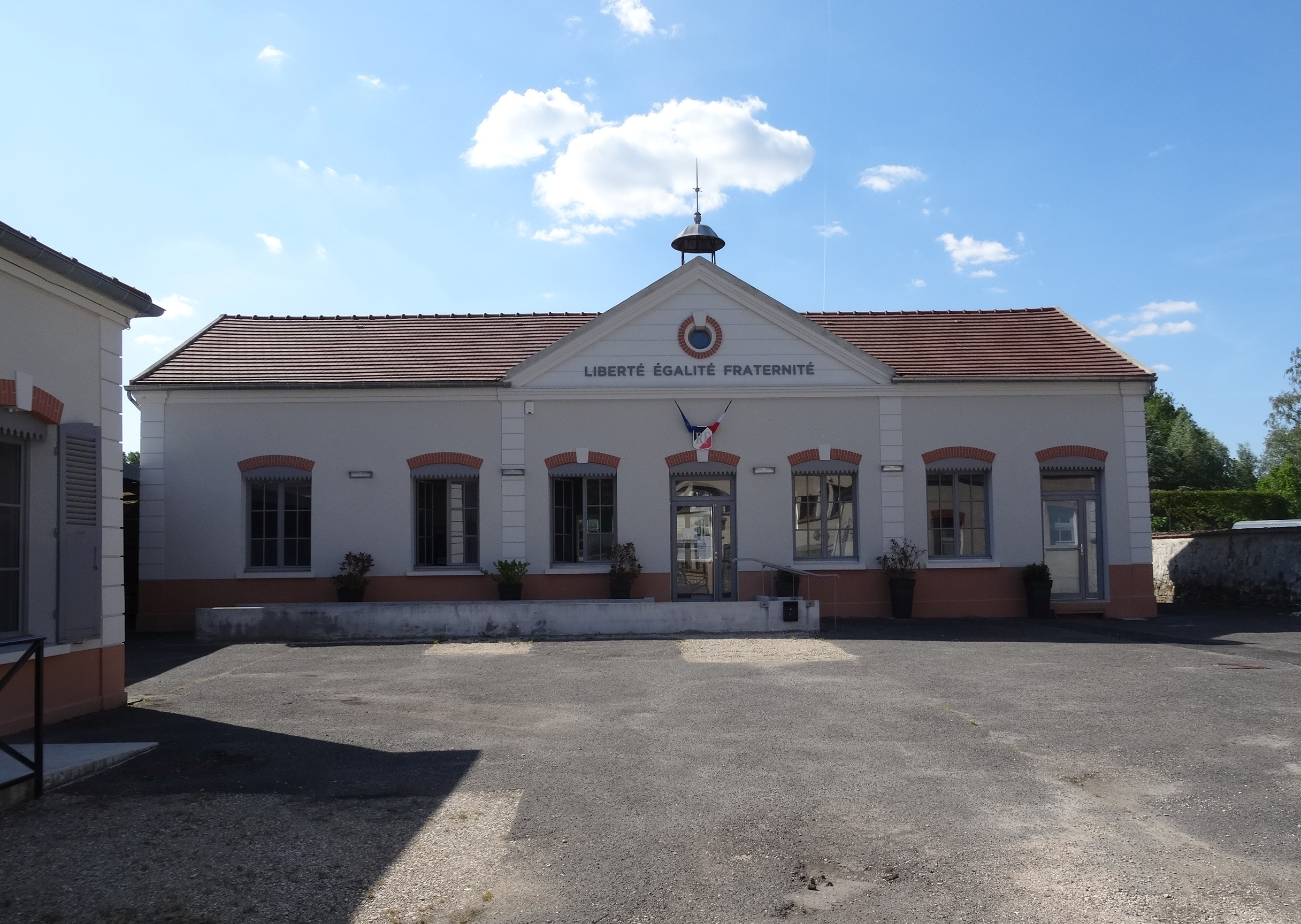 Mairie de Congis-sur-Thérouanne. (Seine-et-Marne, région Île-de-France).